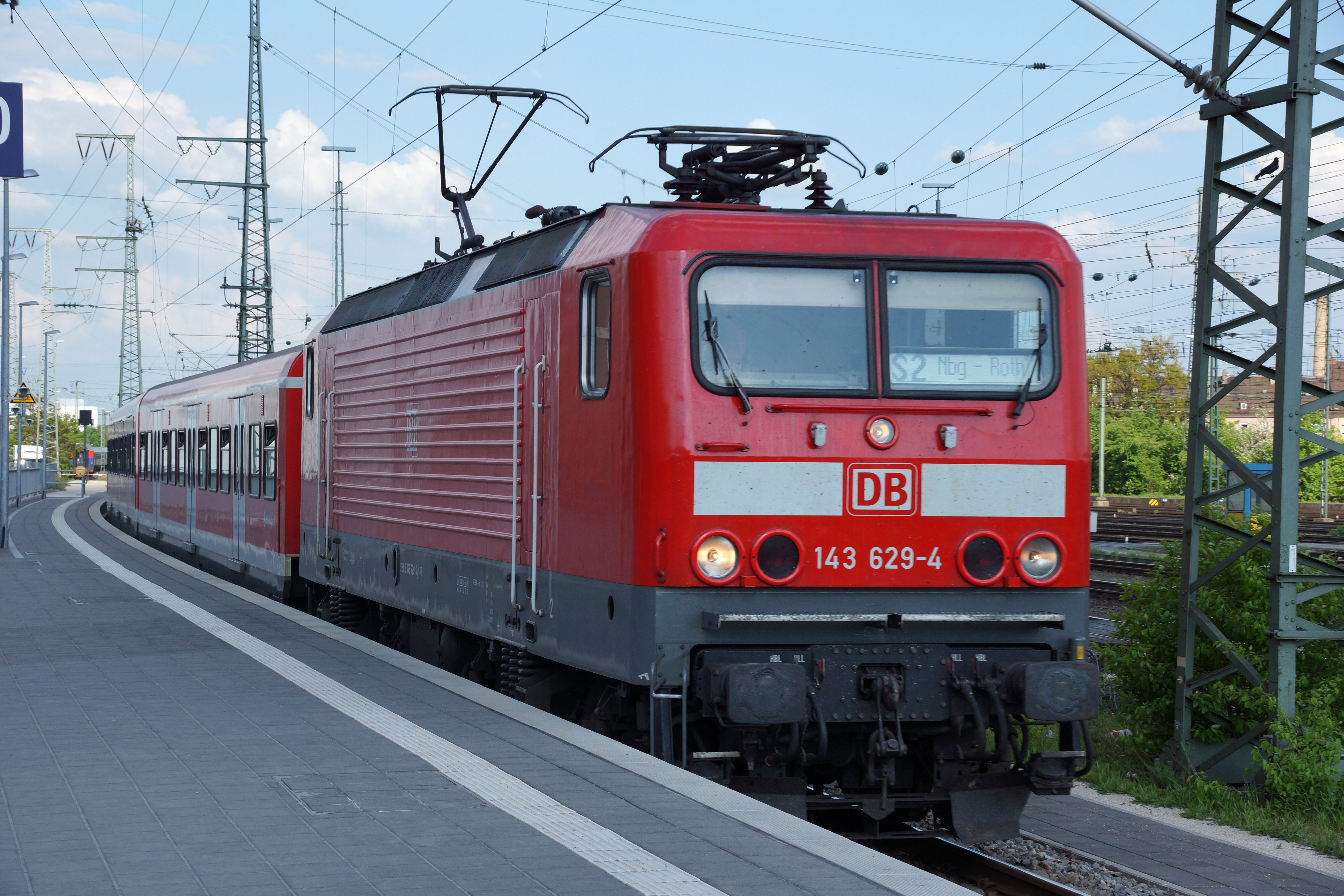 Einfahrende S-Bahn S2 (von Altdorf nach Roth) am Hauptbahnhof in Nürnberg